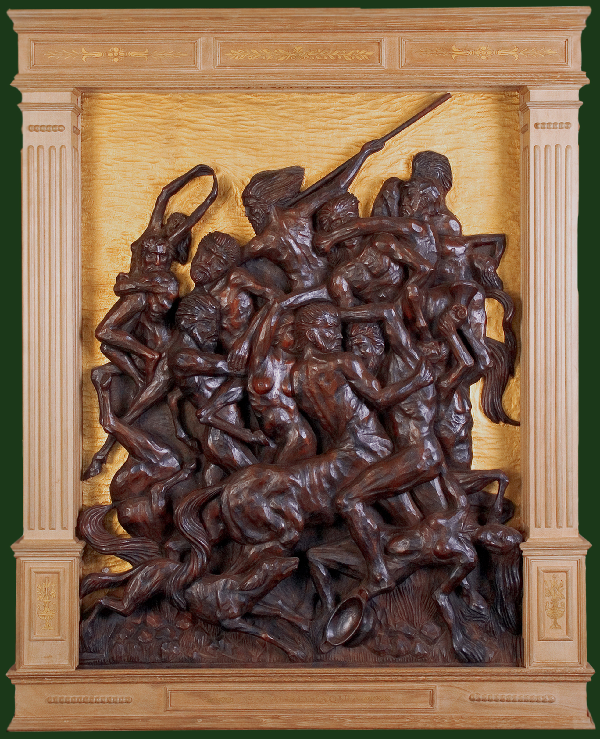 Talla en madera Realizada por J. M. Fëlix Magdalena de 132 por 87 cm. en la que representa el tema mitológico de la lucha de lapitas y centauros.